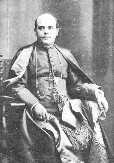 Ilustrísimo Señor Don Eustaquio Nieto y Martín, consagrado recientemente Obispo de Sigüenza.-Fot. Kaulak.